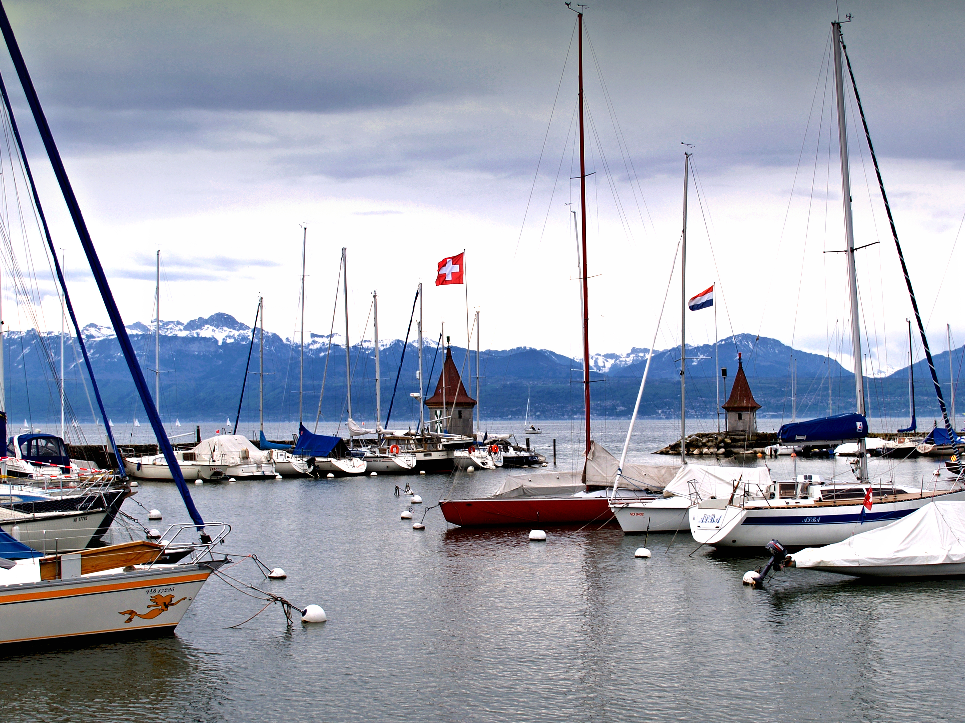 Morges (Suisse) - La passe du port